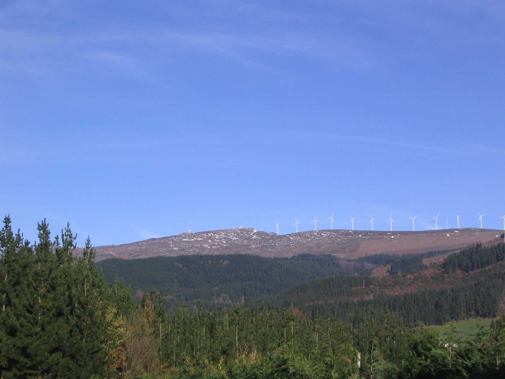 Monte Oiz Garai, Vizcaya, País Vaco, España.